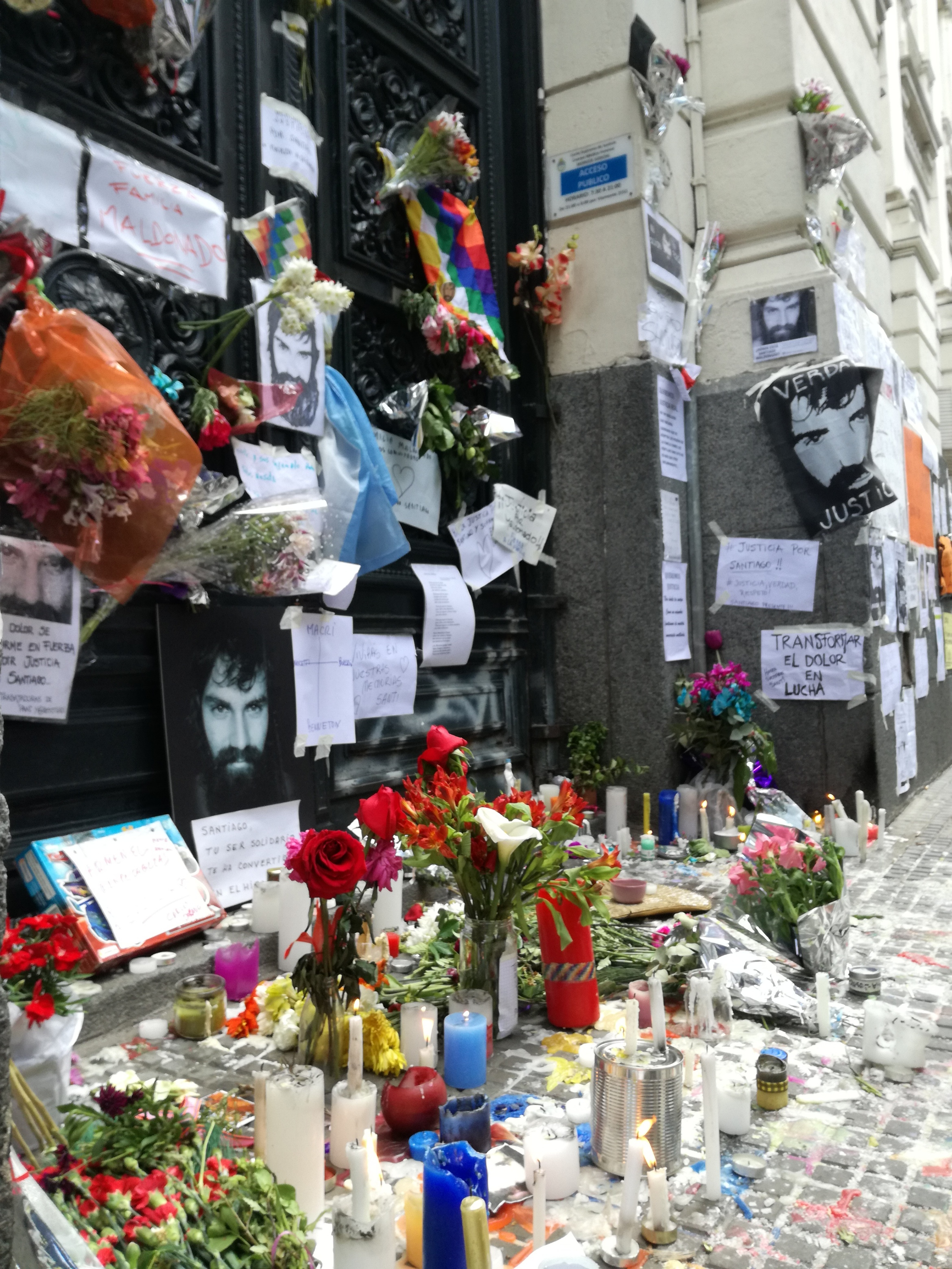 Santiago Maldonado - Memorial popular en la puerta de la morgue de Buenos Aires.